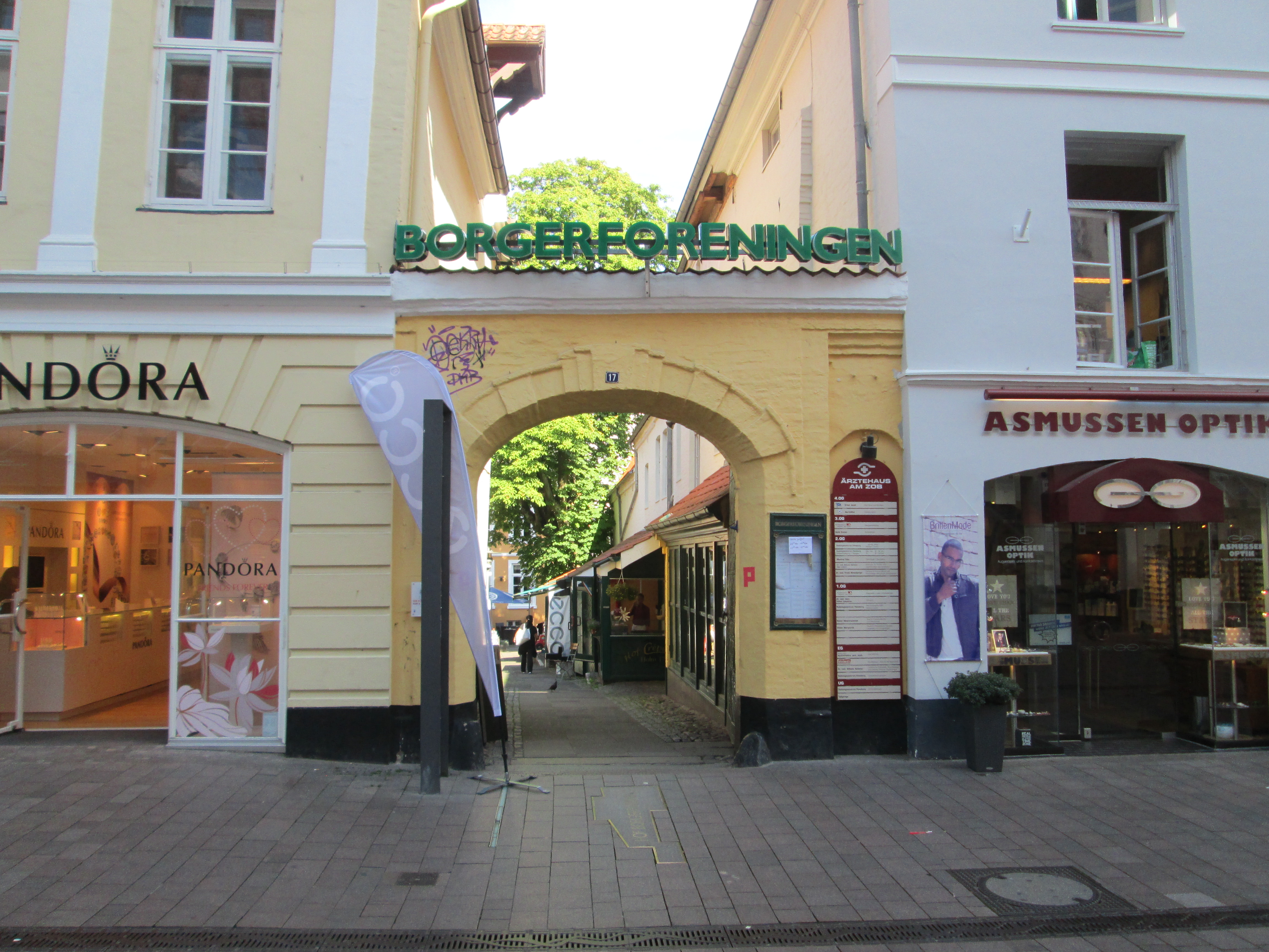 Indgang til Borgerforeningens gård, ved Holmen Flensborg